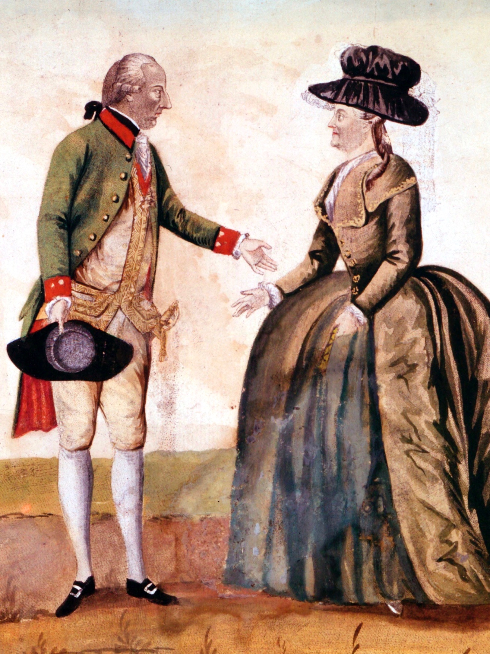 Hieronymus Löschenkohl (1753–1807): Begegnung Kaiser Josephs II. (1741–1790) und Kaiserin Katharinas II. (1729–1796) bei Kodak am Dnjepr, 18. Mai 1787 (Ausschnitt).